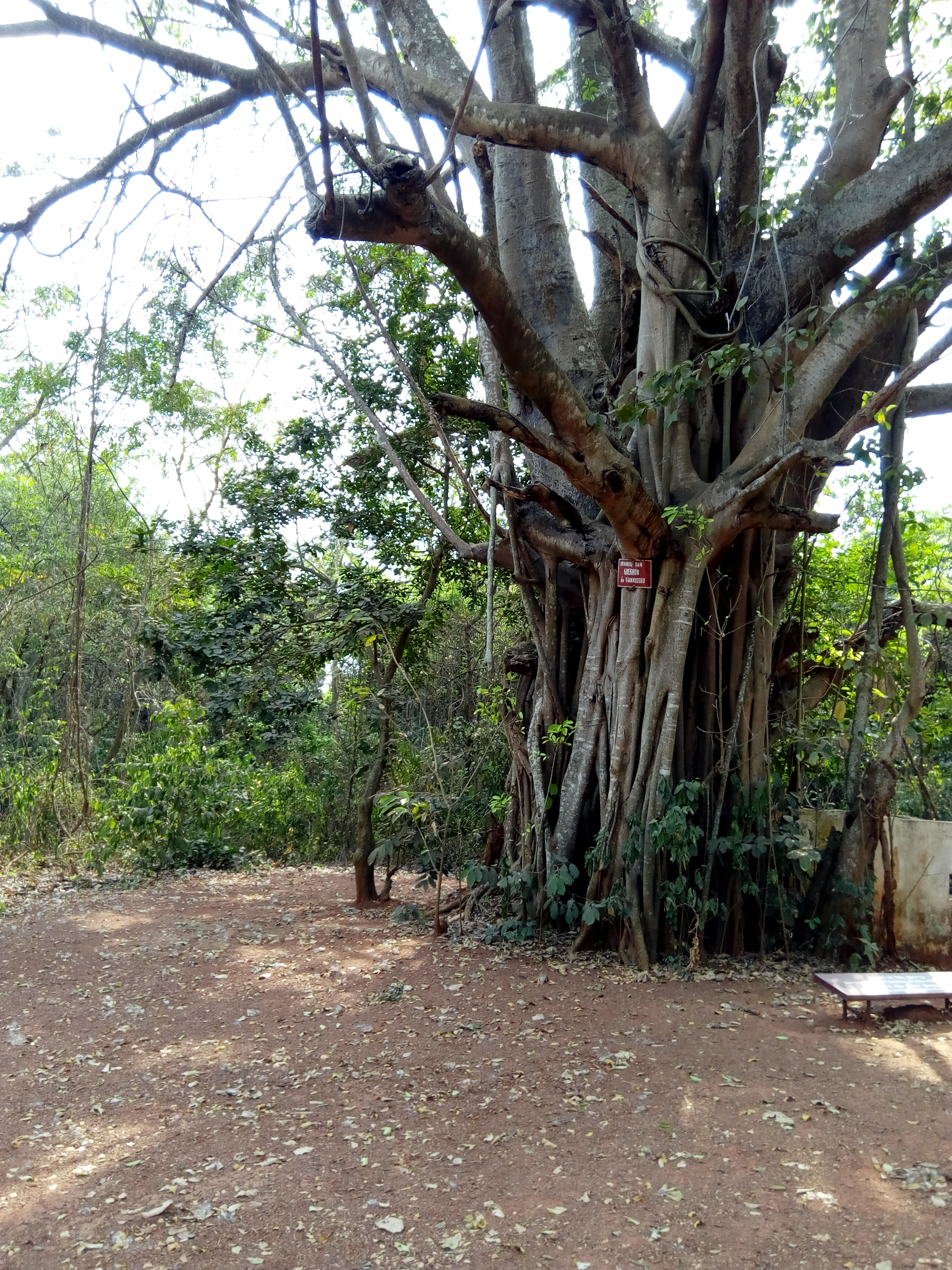 arbre géant au village souterrain d'Agongointo